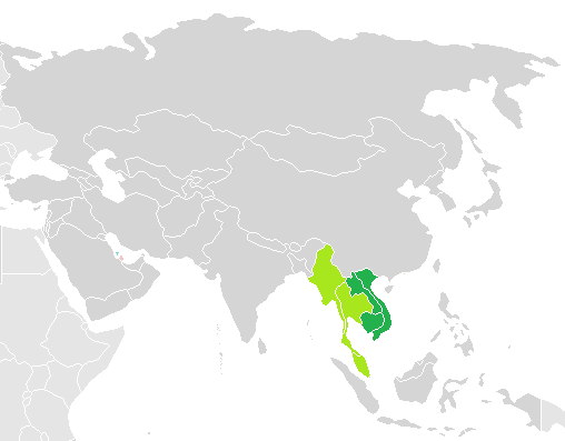 Português do Brasil: Mapa da Indochina.